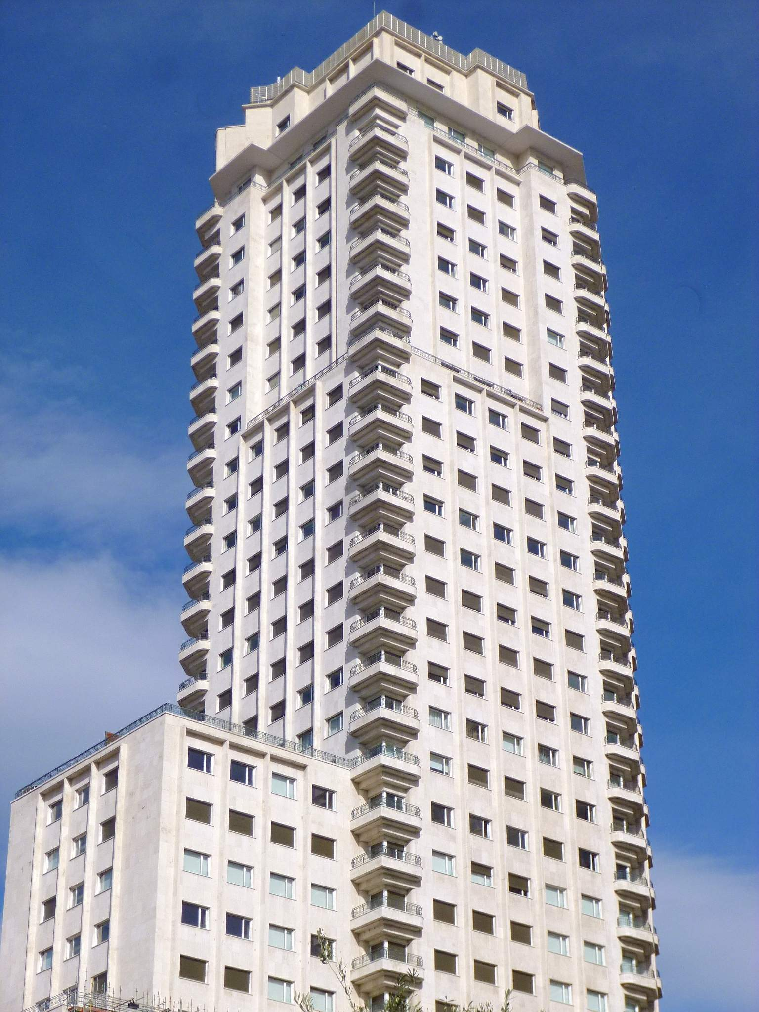 Madrid - Plaza de España, Torre de Madrid